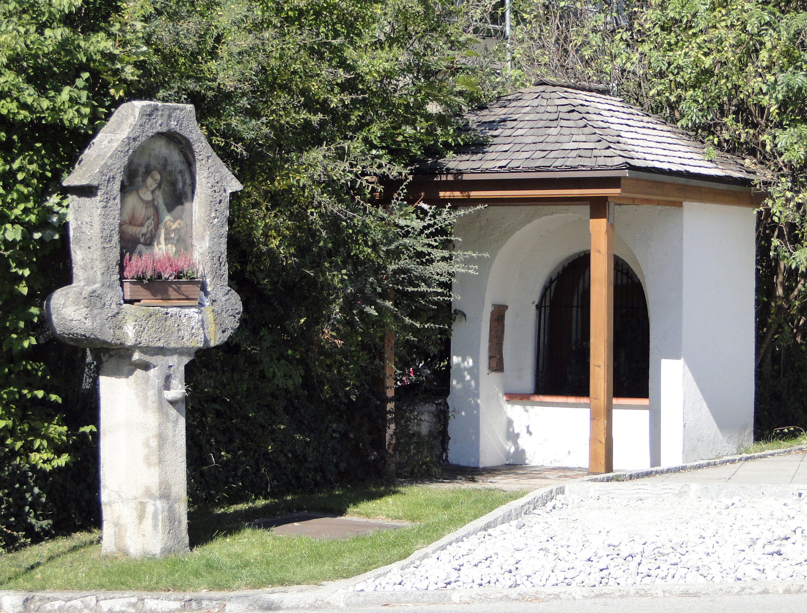 Daghofer Kapelle und Bildstock; Breitengrad: 47.80576891, Längengrad: 13.02673817